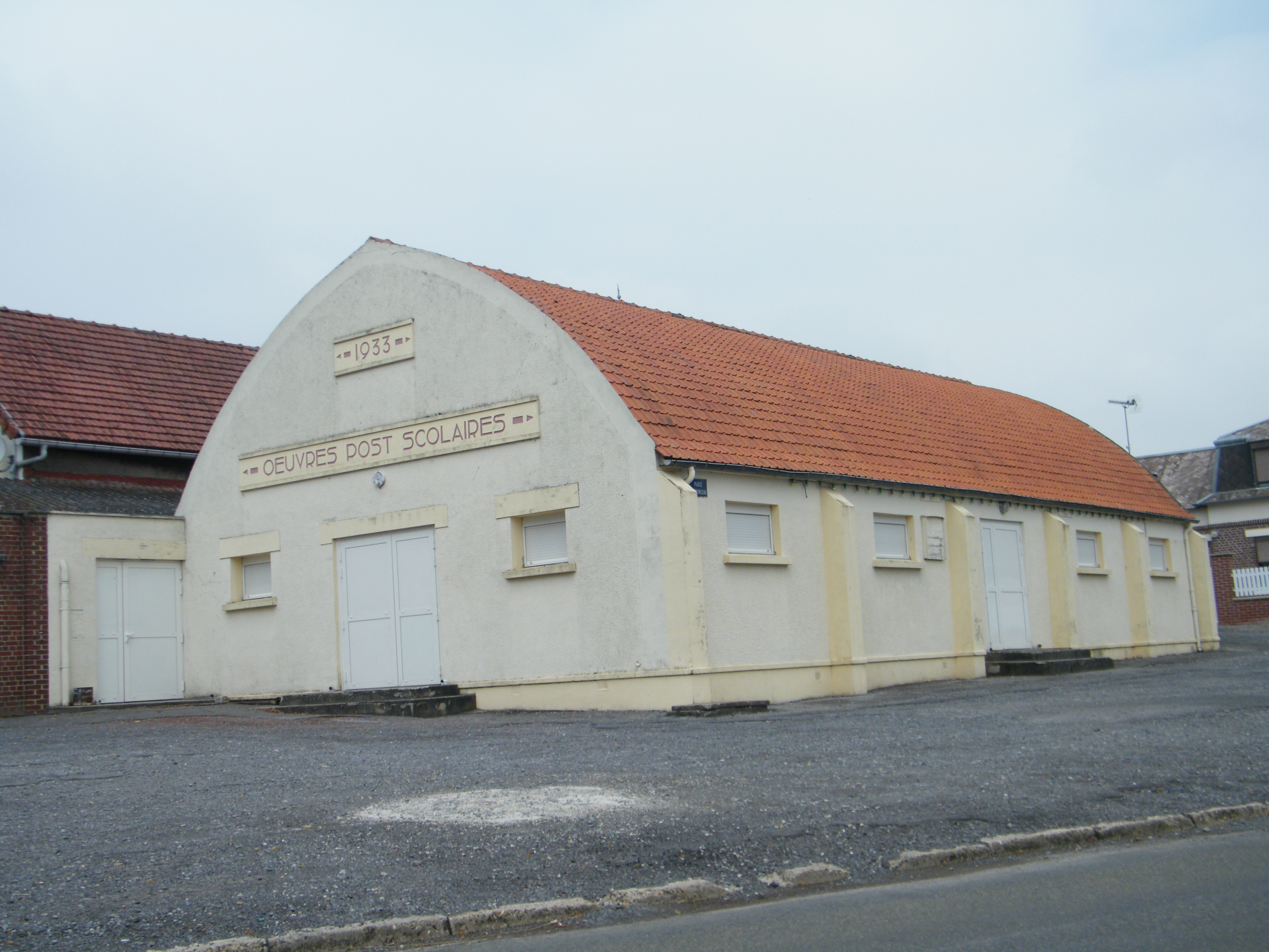 Salle communale.